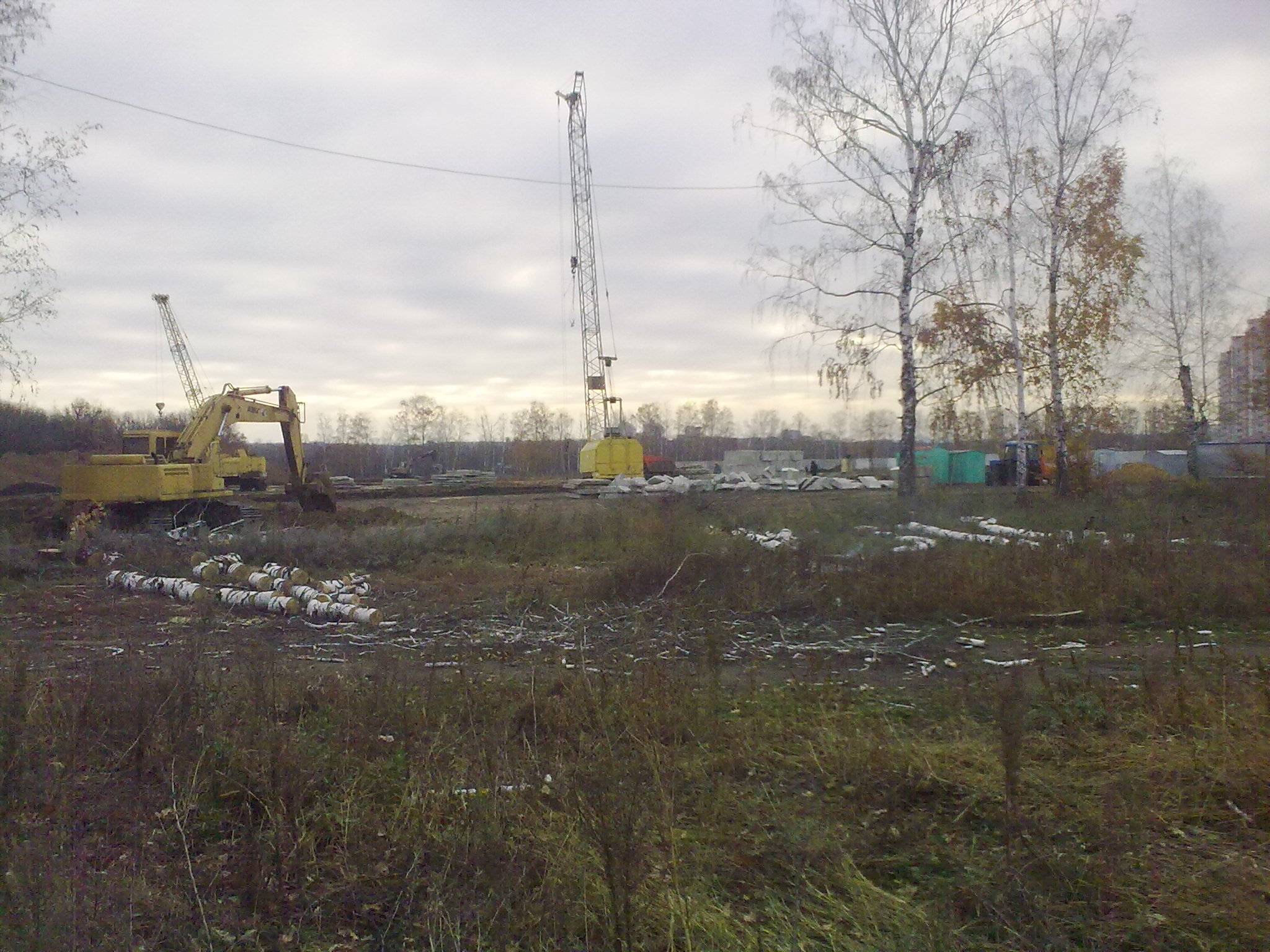 Строительная площадка между улицами Шишкова и Ломоносова в Воронеже